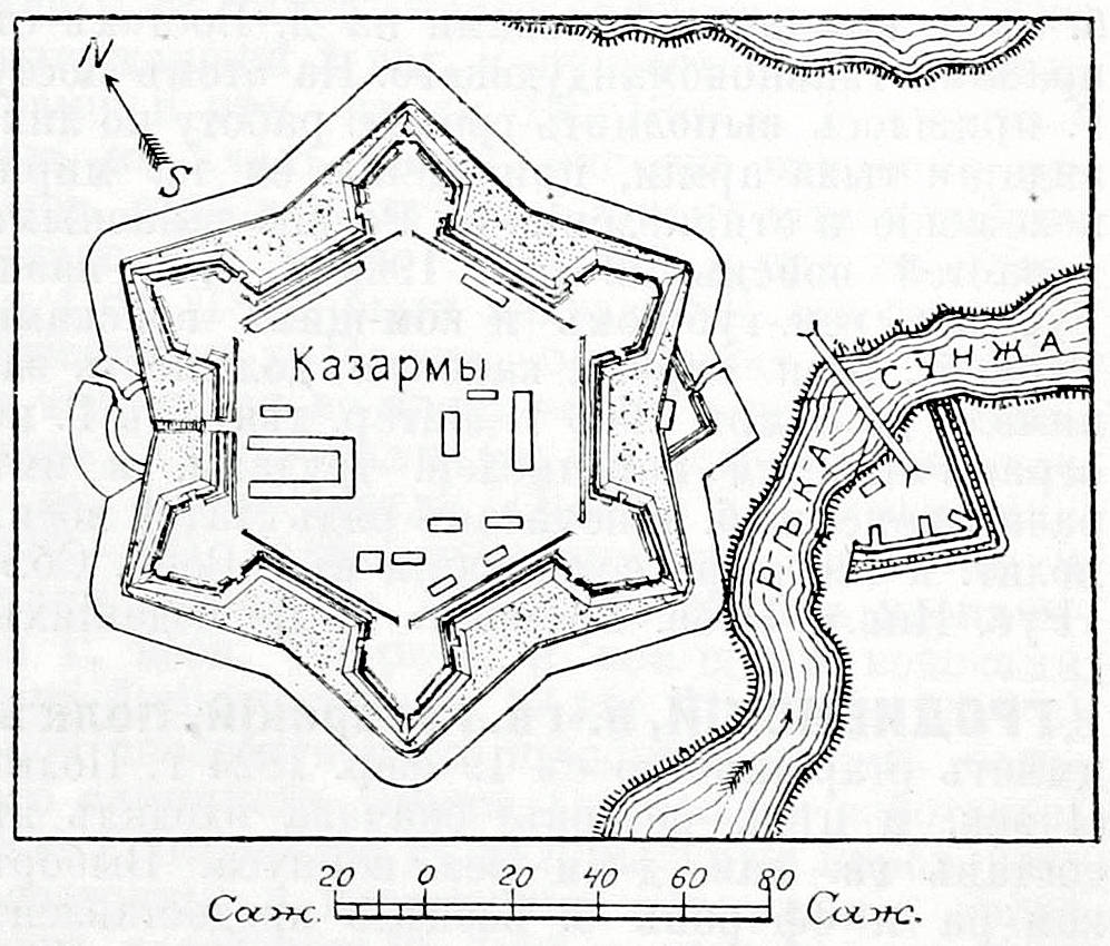 Это изо было использовано в статье «Грозная» опубликованной в восьмом томе «Военной энциклопедии», который был издан книгоиздательским товариществом И. Д. Сытина в 1912 году в столице Российской империи городе Санкт-Петербурге.